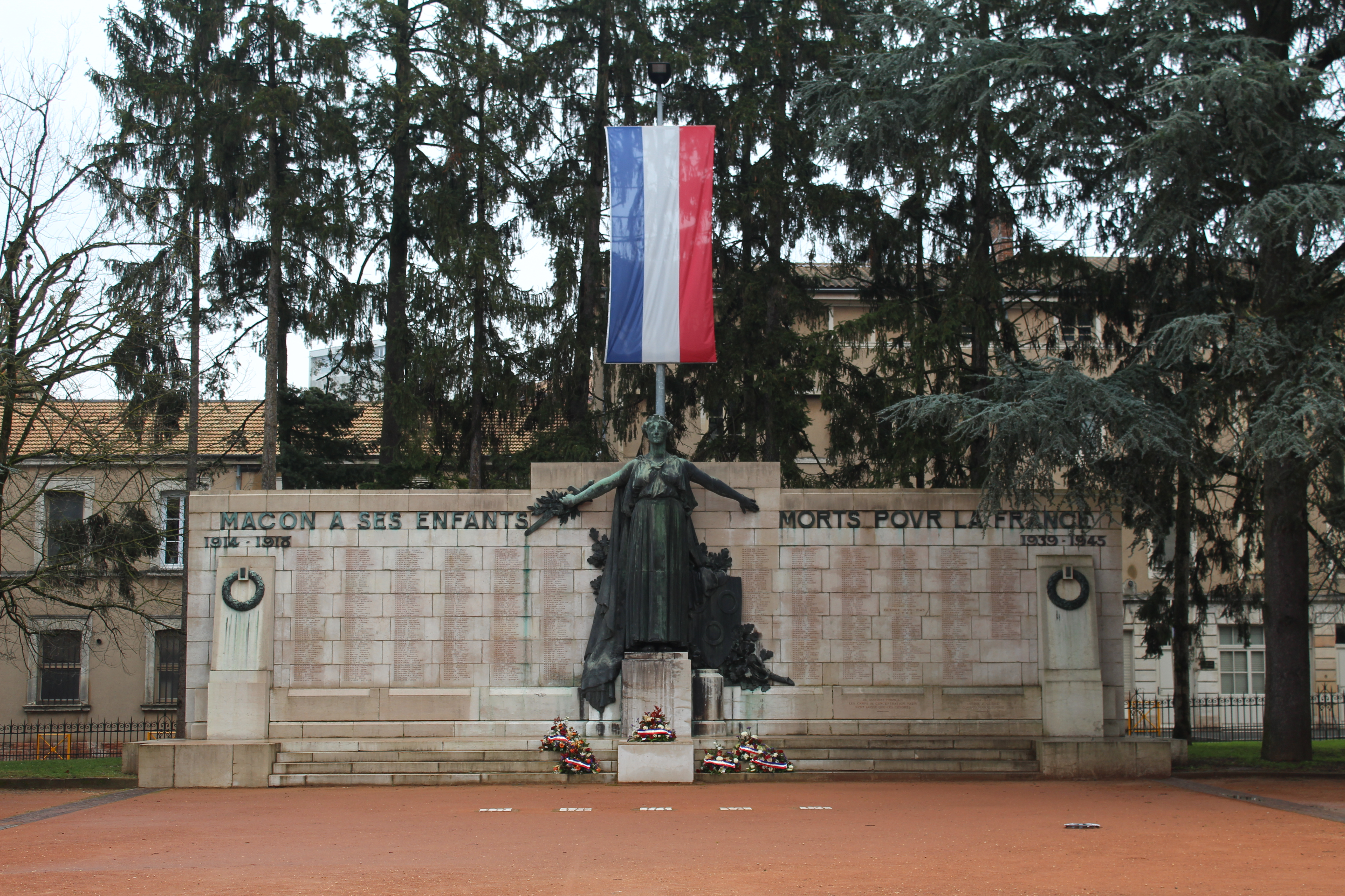 Monument aux morts du square de la Paix de Mâcon.